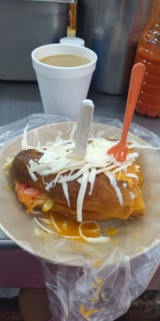 Tradicional torta ahogada de San Juan de los Lagos, elaborada con carnitas, salsa roja, chiles de vinagre, crema y queso.